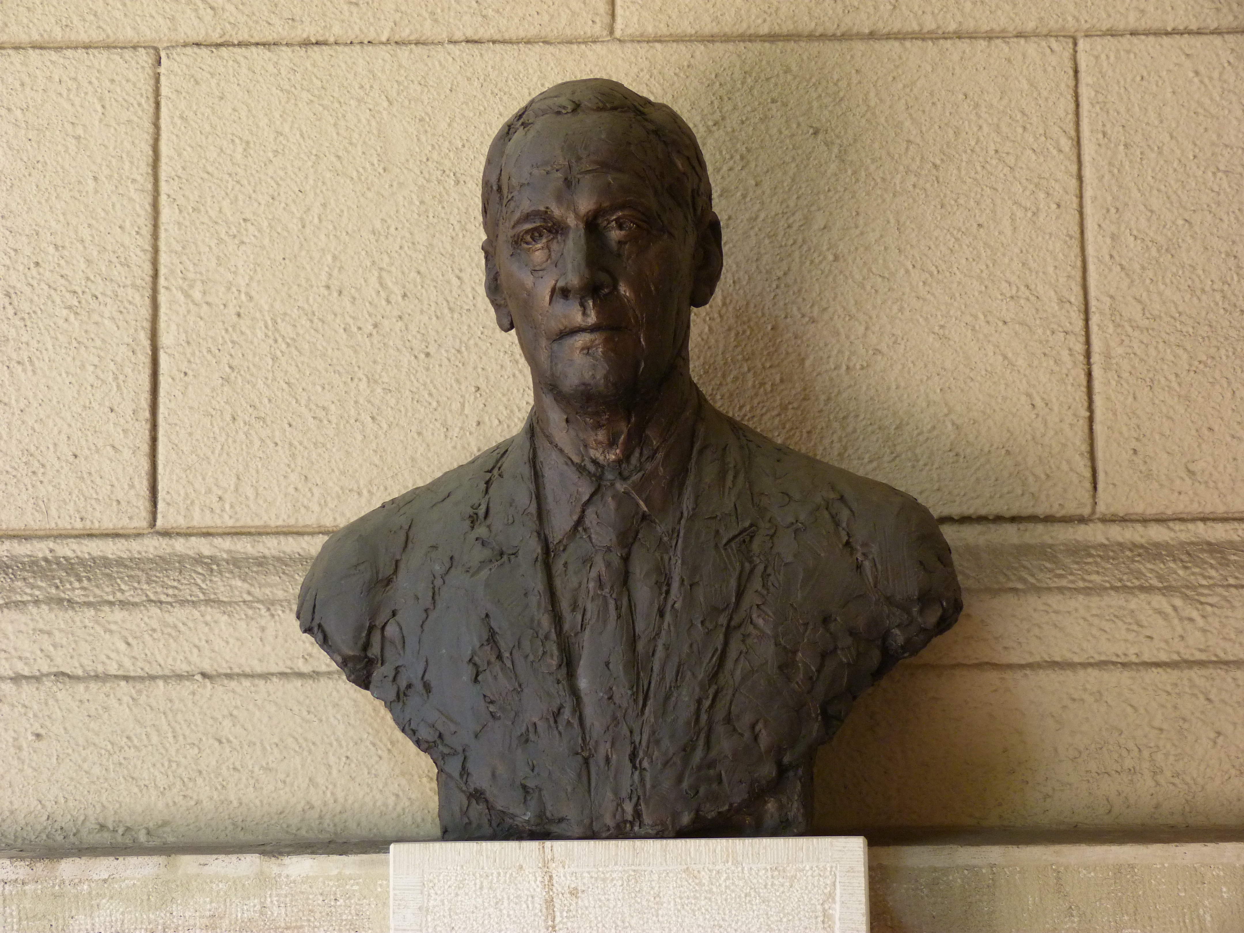 A felvétel 2012. május 19 -én készült Budapesten, a Kossuth téren. Horn Artúr akadémikus mellszobra a Mezőgazdasági és Vidékfejlesztési Minisztérium falán. ©© Derzsi Elekes Andor, Budapest, 2013, A kép és filmfelvételek egészben, vagy részletekben másolását, bármilyen úton történő sokszorosítását és felhasználását a szerző ellenérték nélkül, jogutódjaira is kihatóan megengedi. Az engedély kiterjed a kereskedelmi célú hasznosításra is. Kéri azonban nevének feltüntetését a felhasználás során. A Metapolisz sorozat valamennyi képe és filmje Creative Commons alatti valamint kereskedelmi - for profit - célra is felhasználható. Ajánlott hivatkozás: Derzsi Elekes Andor: Metapolisz DVD line